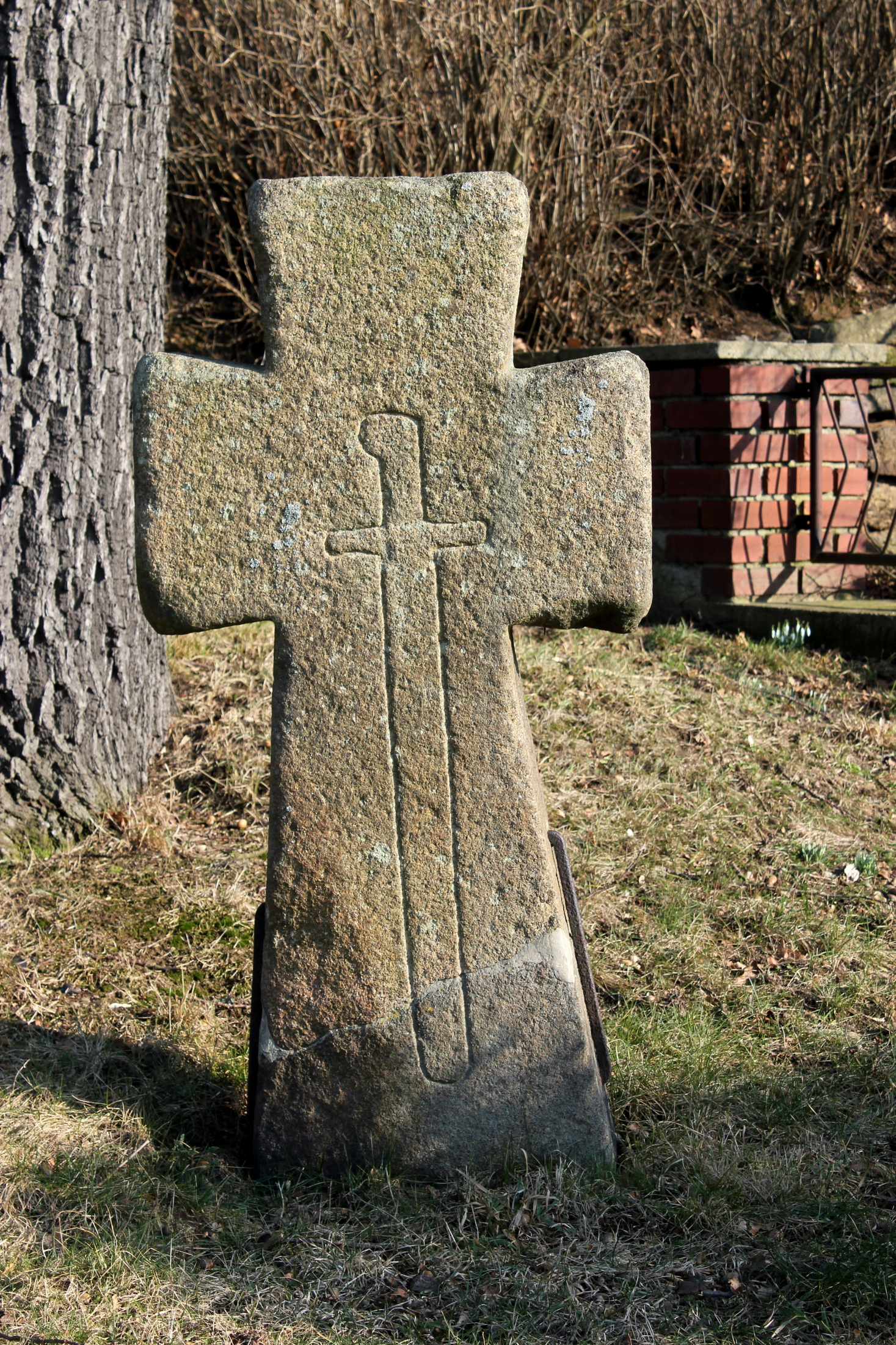 Hornjoserbsce: Haslow; kamjentny křiž we wuchodnym wjesnym dźělu.